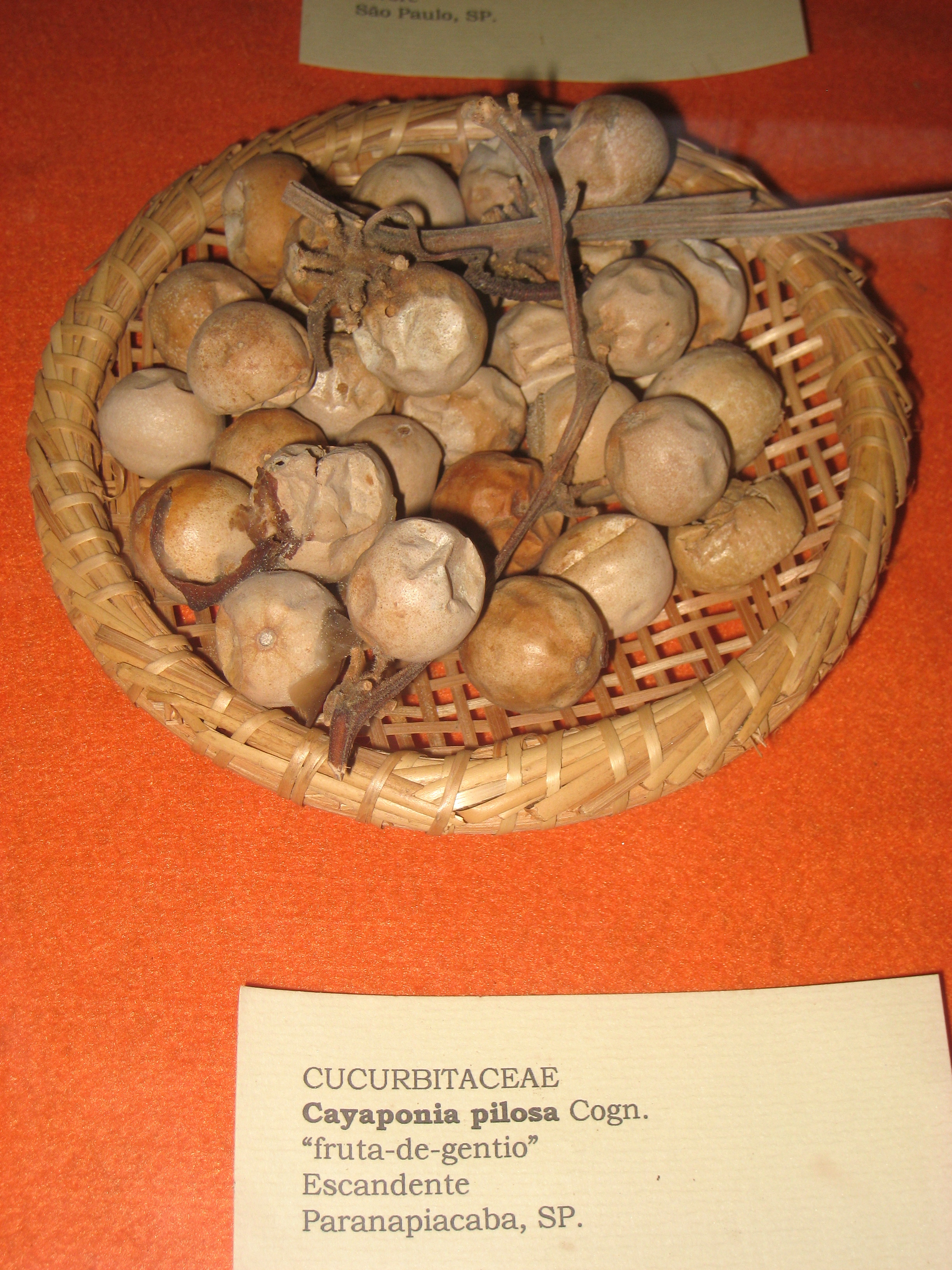 Cayaponia pilosa specimen in the Museu Botânico Dr. João Barbosa Rodrigues, Jardim Botânico de São Paulo, São Paulo City, SP, Brazil.